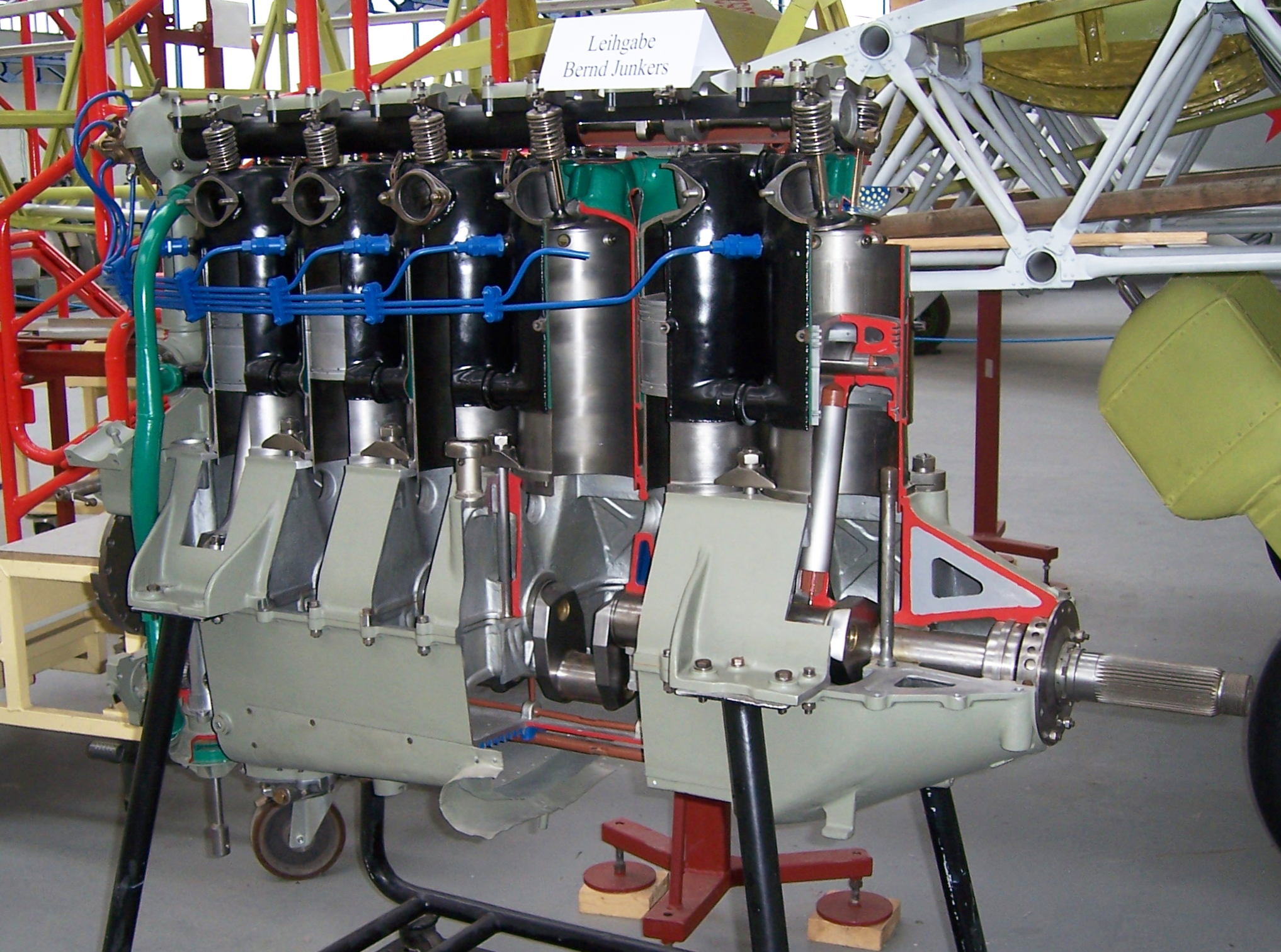 Flugmotor Junkers L 5 im Technikmuseum Hugo Junkers Dessau 2010-08-06